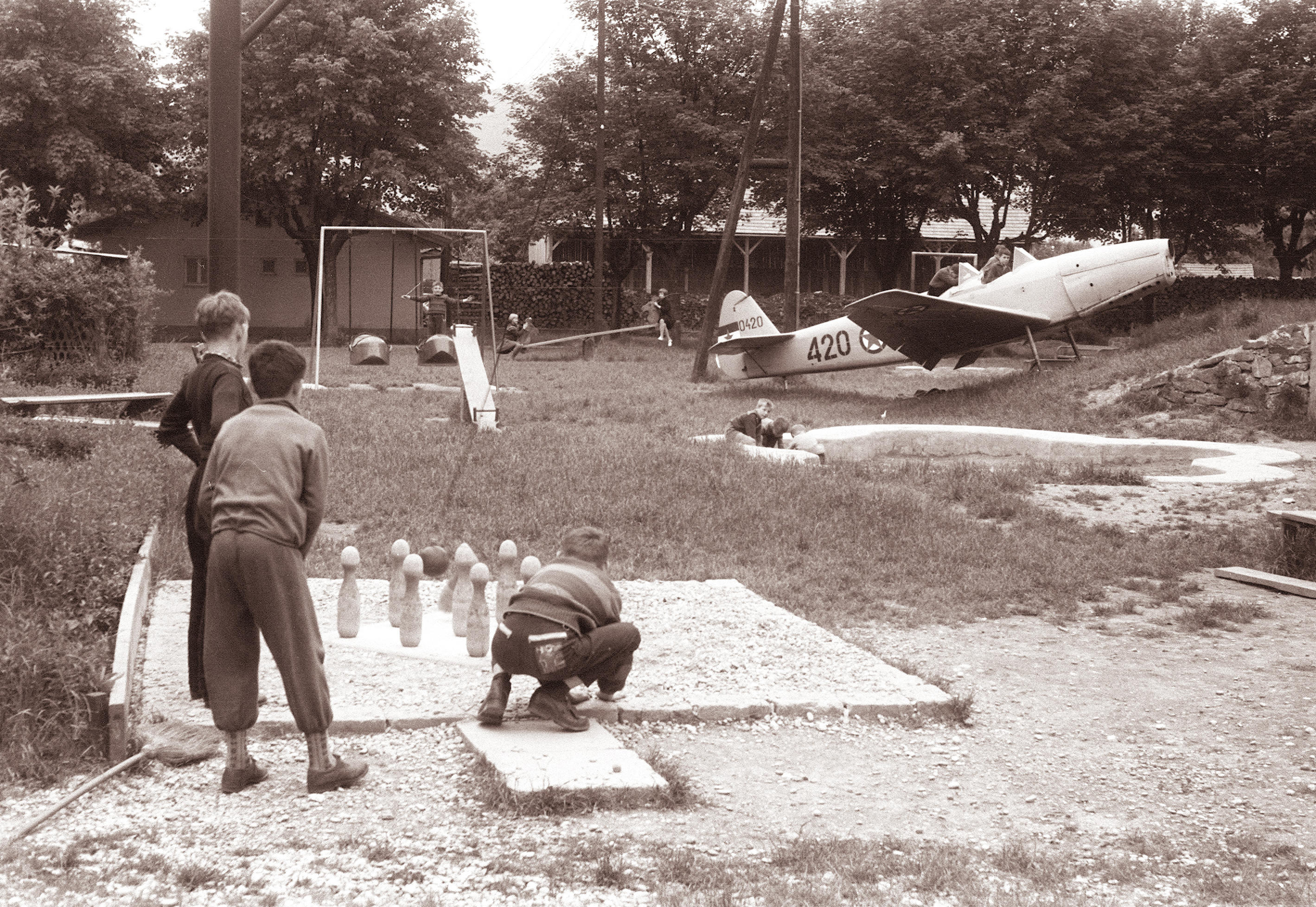 Igrišče med blokoma ob Smetanovi ulici